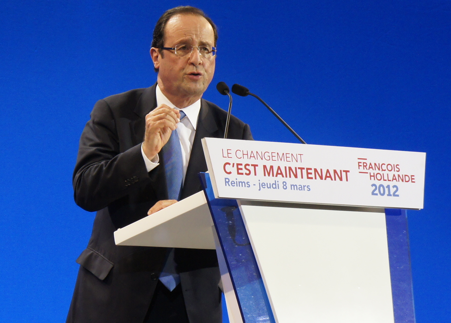 Réunion publique du candidat François Hollande à Reims.